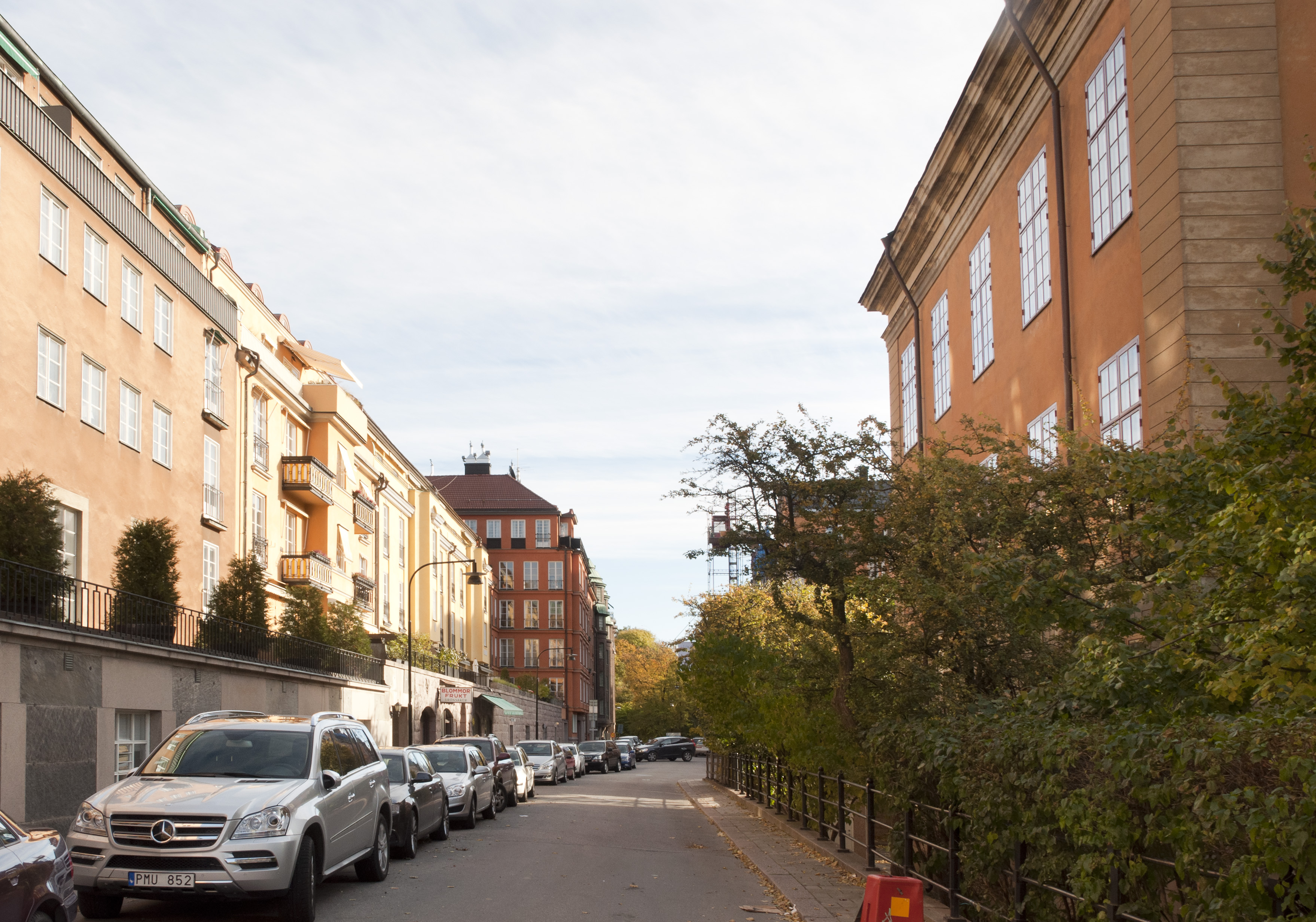 Ulrikagatan